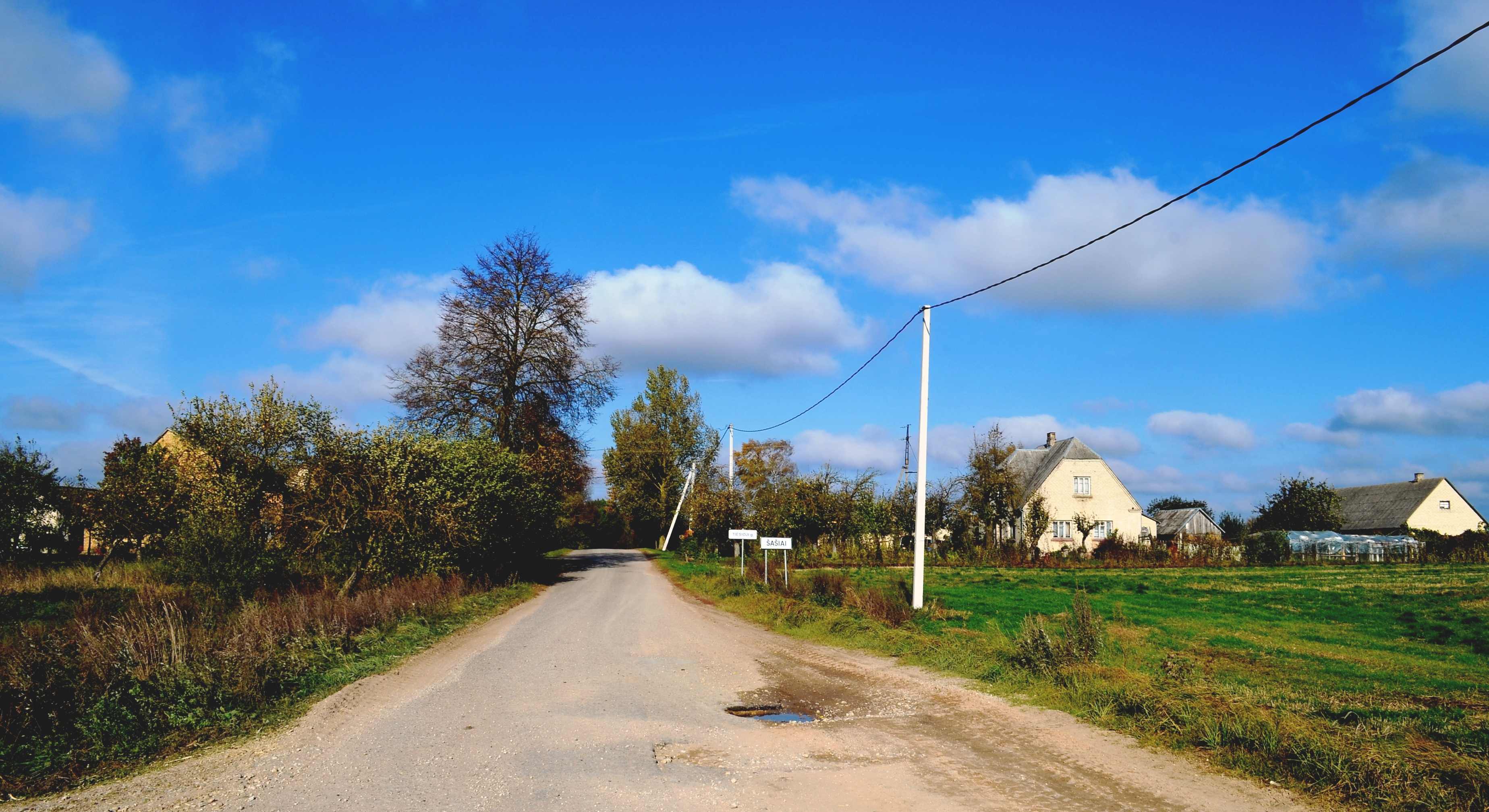 Šašiai, Radviliškio raj.